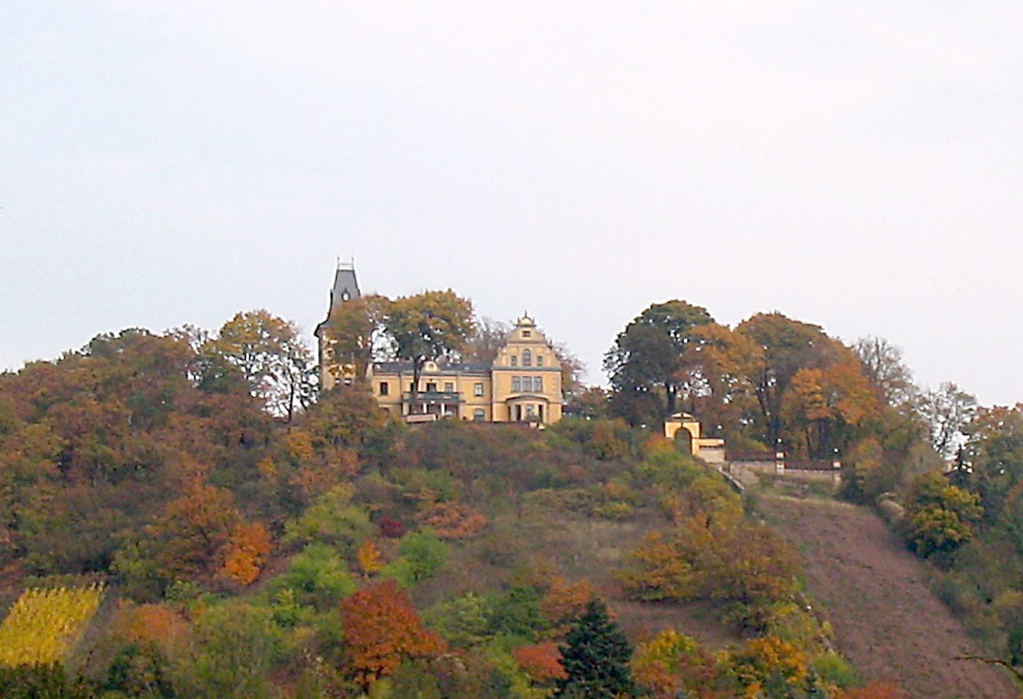 Wettinhöhe (Radebeul), oben das Haus Wettinhöhe